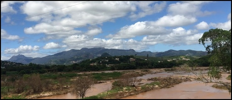 Cadeia de montanhas nos arredores de Conselheiro Pena, que possui a forma de uma moça adormecida.